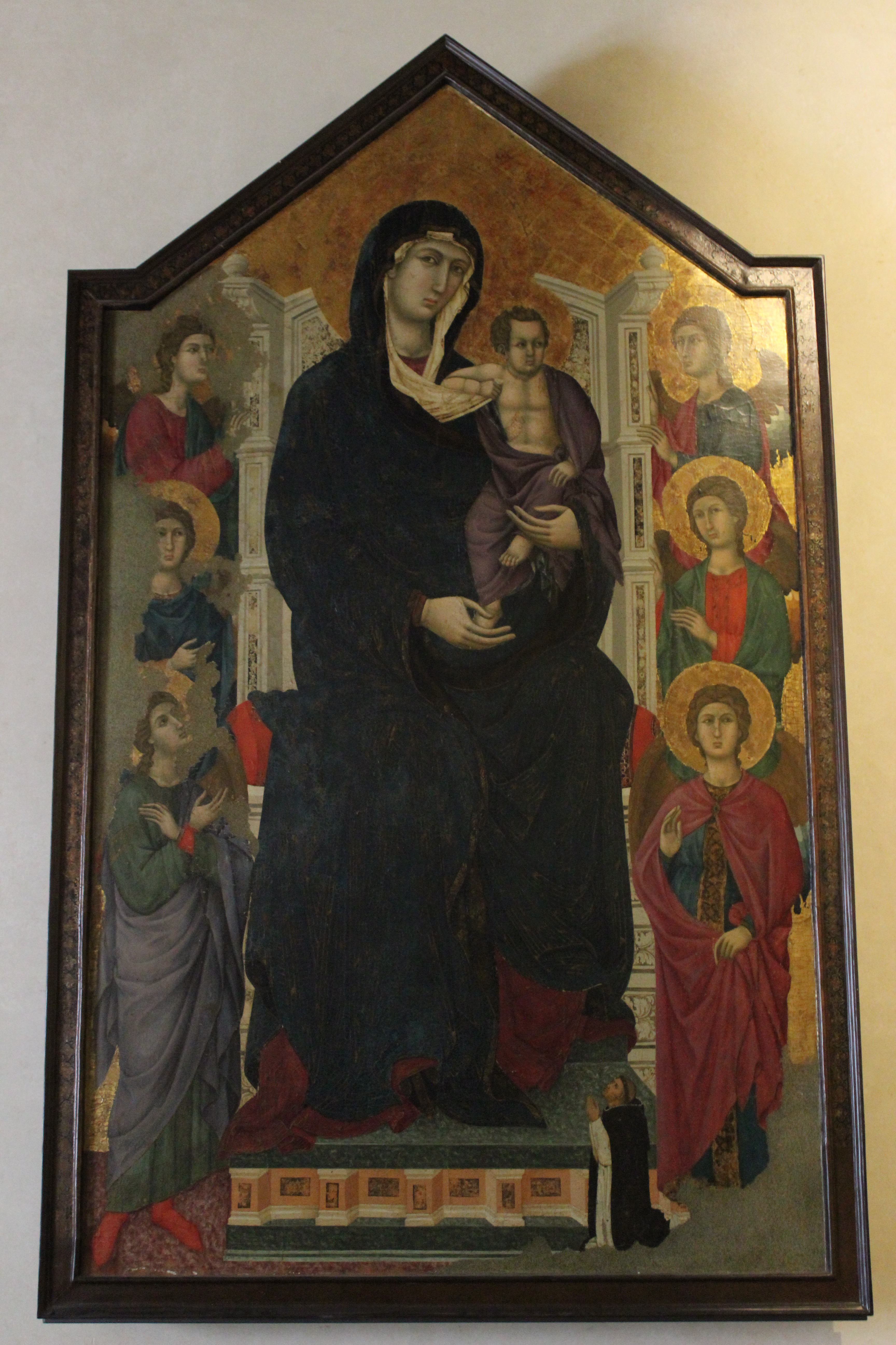 Città di Castello. Pinacoteca. Virgen con el Niño y ángeles. Maestro di Città di Castello.